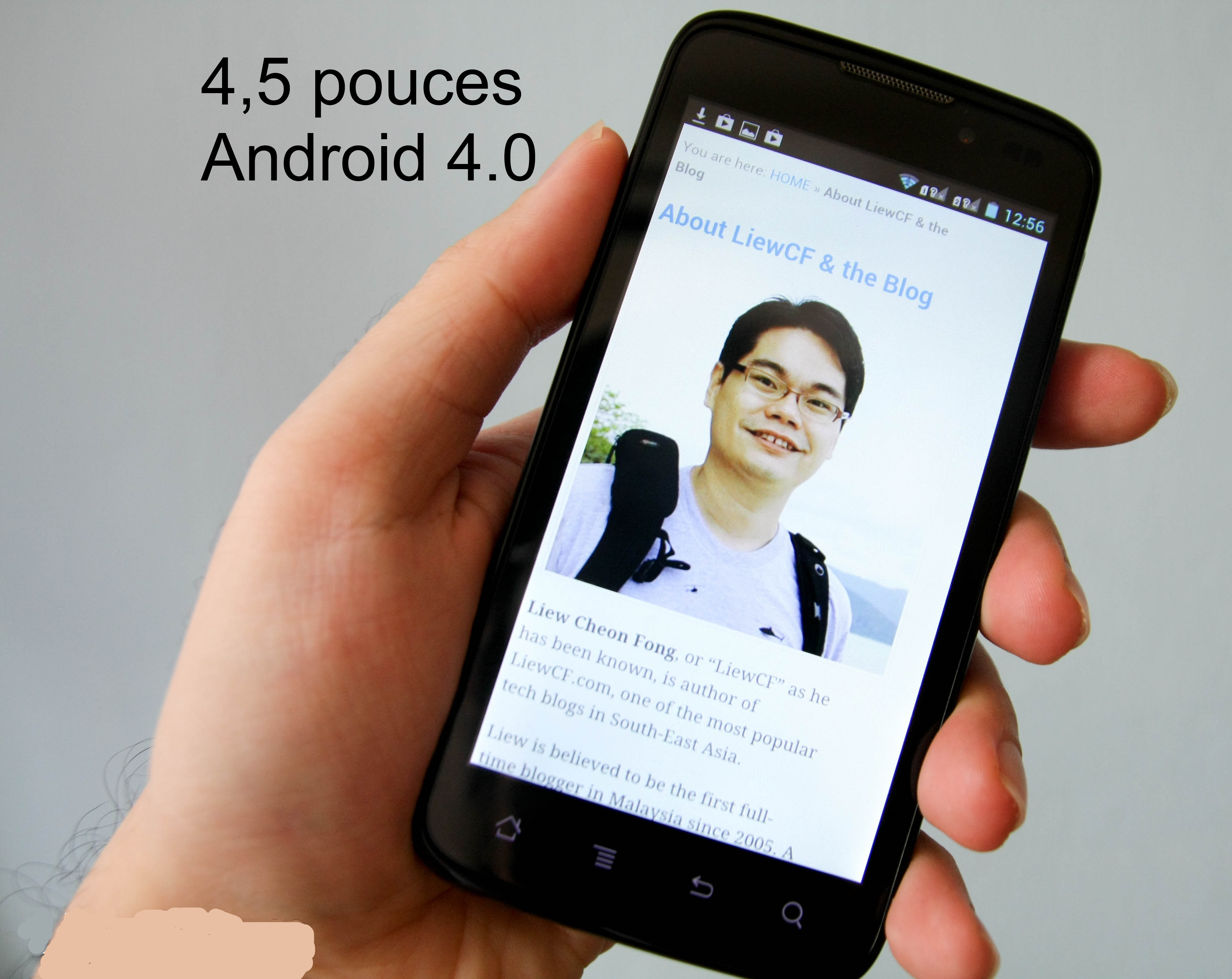 Un smartphone de 4,5 pouces de diagonal 16:9 avec comme système d'exploitation Android 4.0